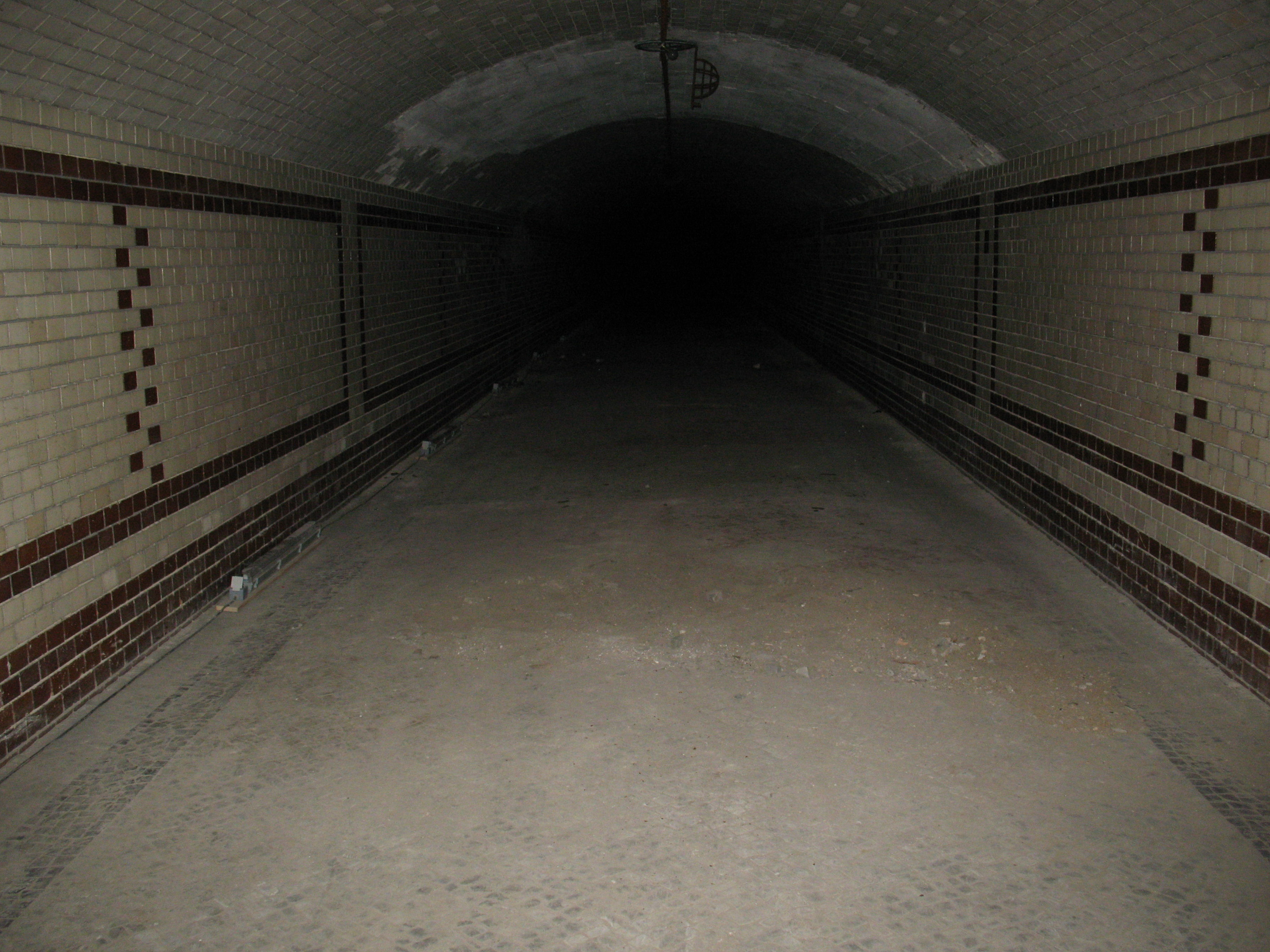 Stettiner Tunnel, 13. September 2008